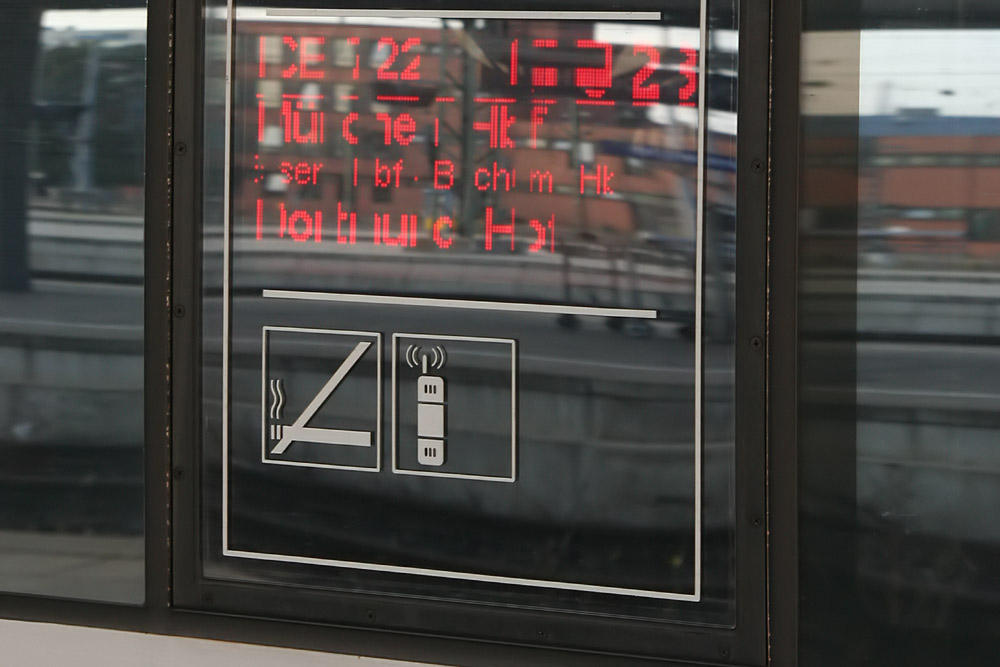 Außen am Zug angebrachtes Symbol für die Handyzone im Intercityexpress.